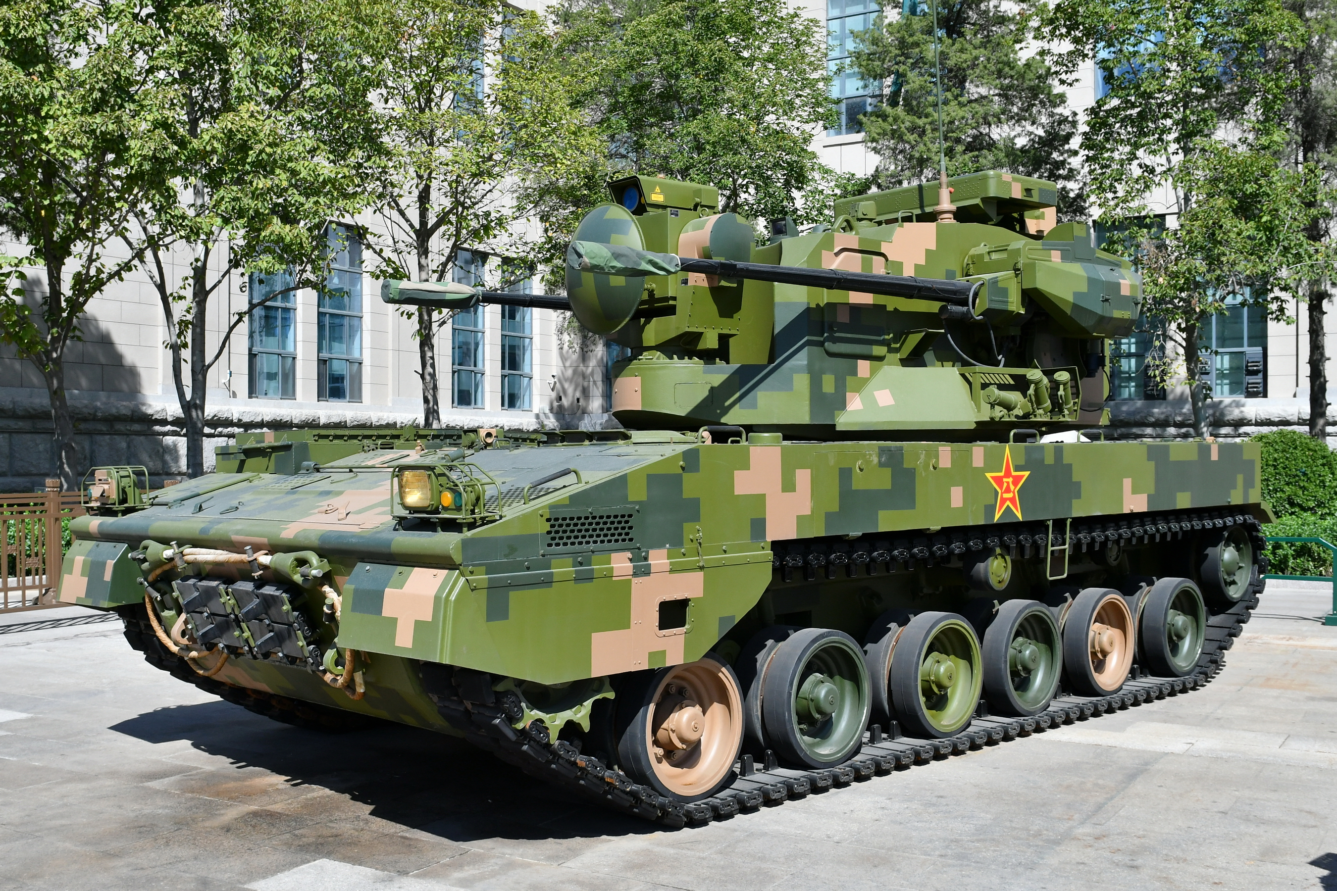 中国人民革命军事博物馆纪念中国人民解放军建军90周年主题展览展出的PGZ-09 双35毫米自行高炮。